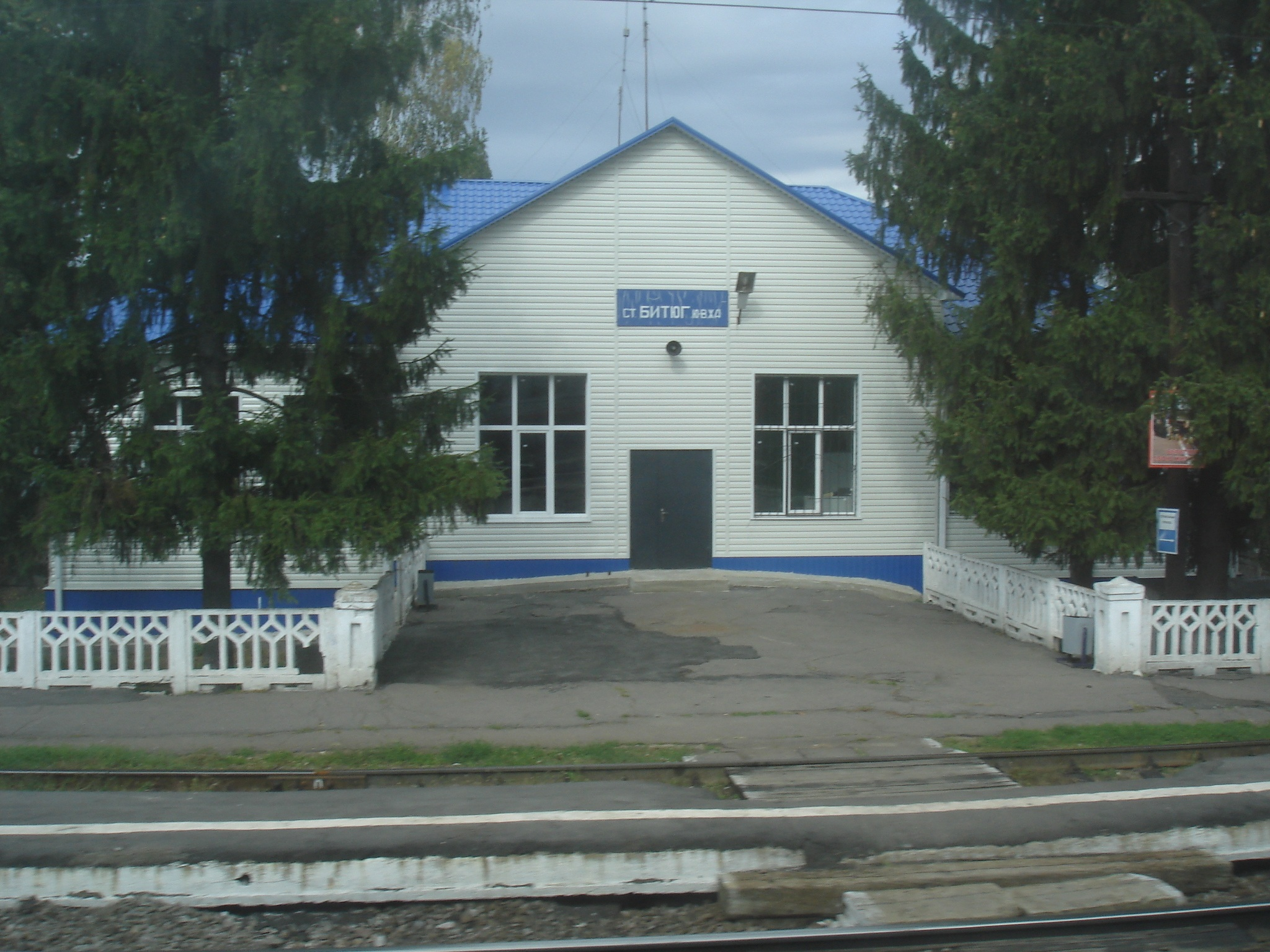 Железнодорожная станция Битюг